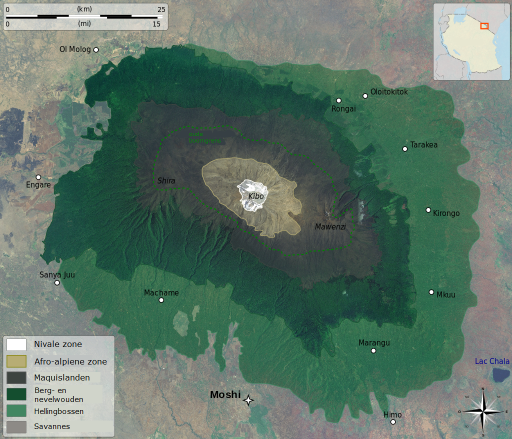 Vegetatiezones Kilimanjaro